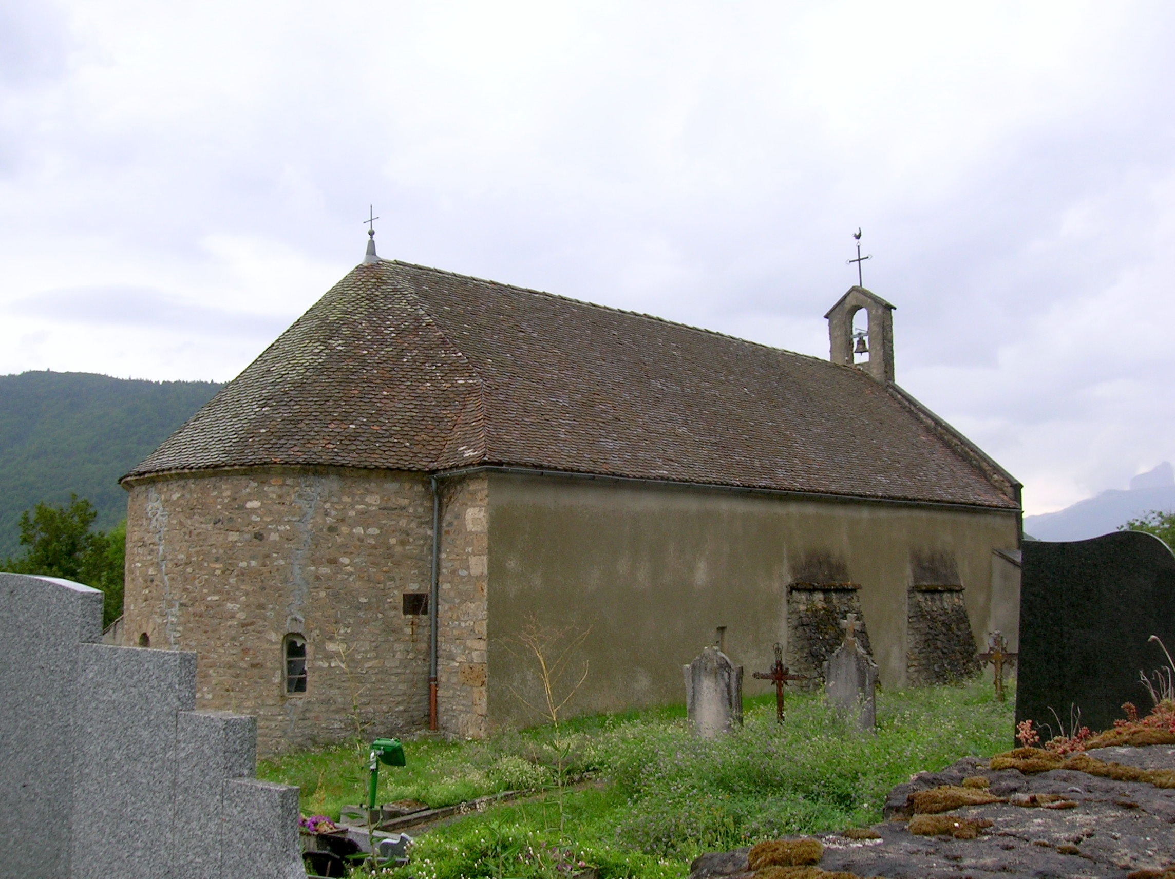 Saint-Arey (Isère), France.